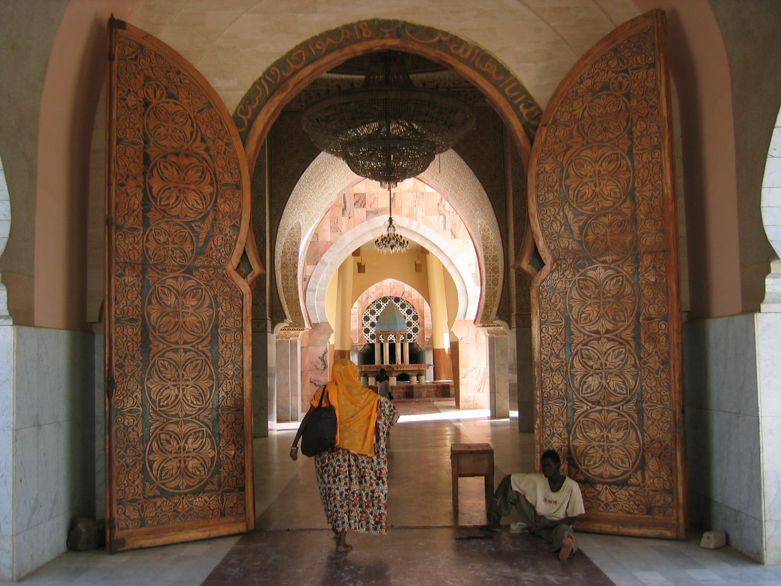 Touba, Senegal, Moschee